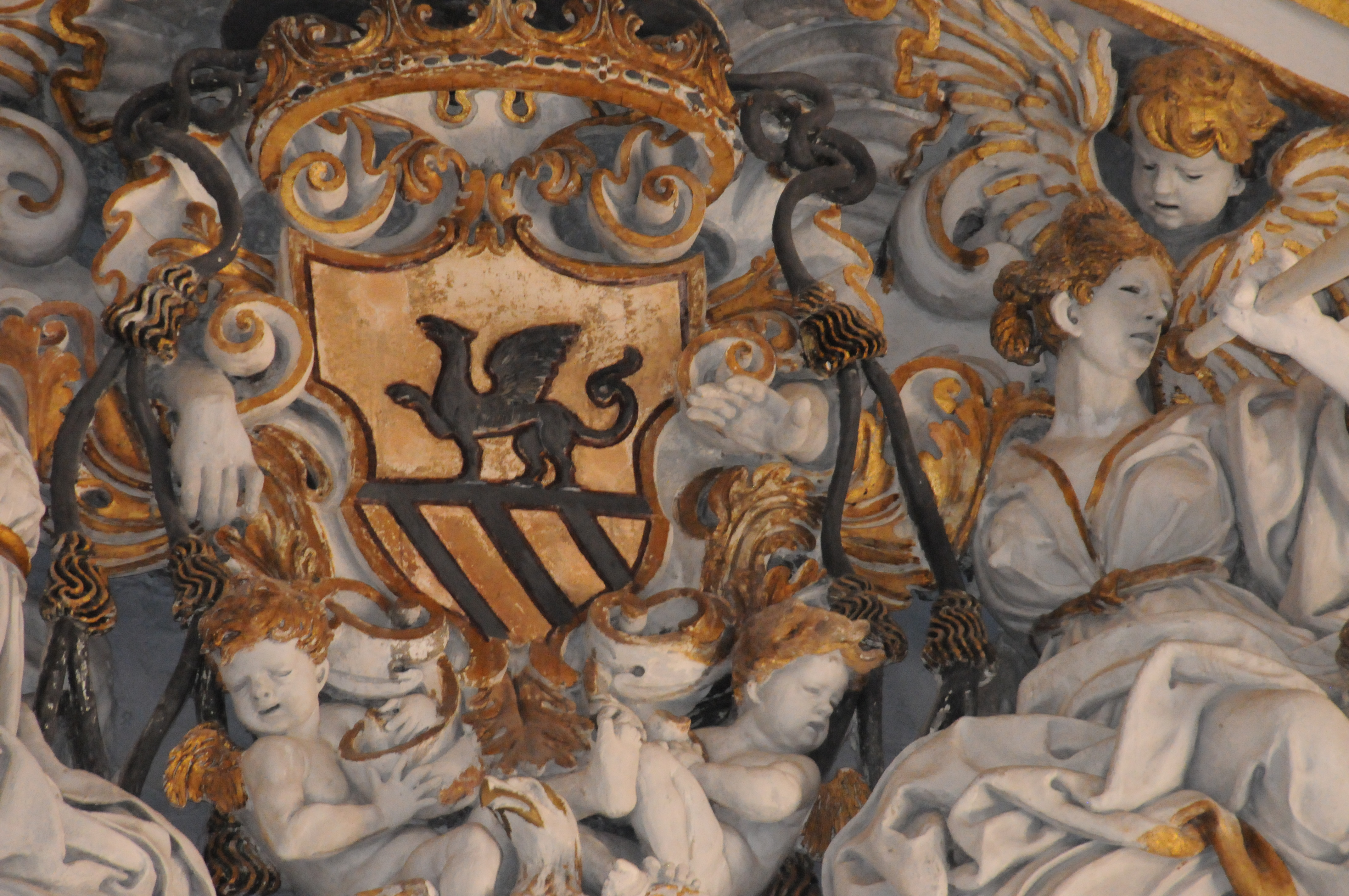 Stemma Grifeo di Partanna, Volta Chiesa Mazzara del Vallo